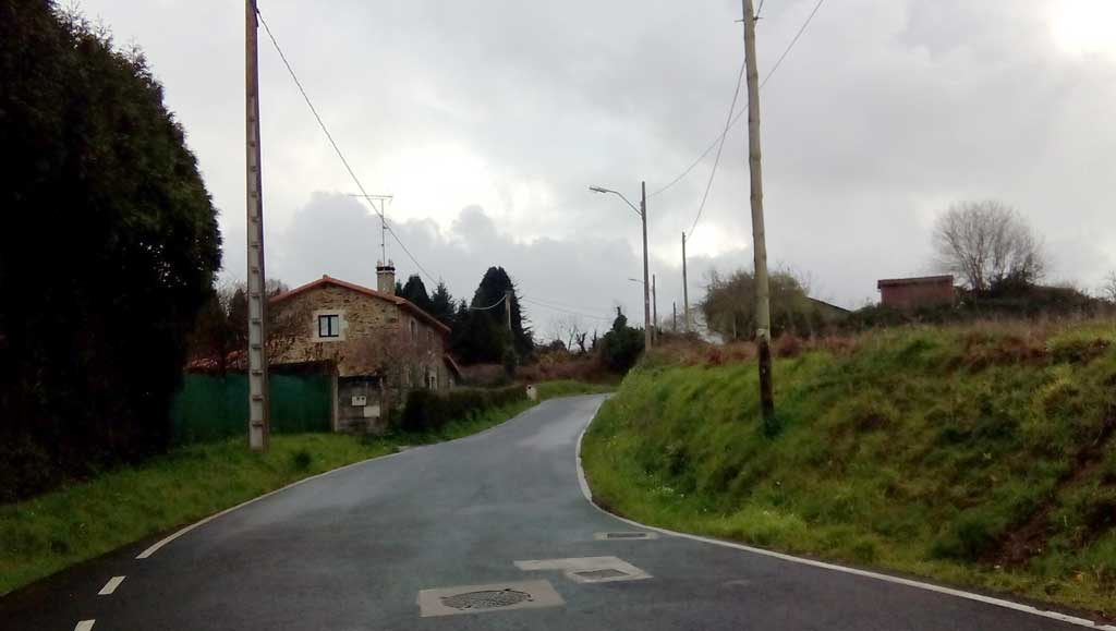 Vista da Pega, Ferrol.